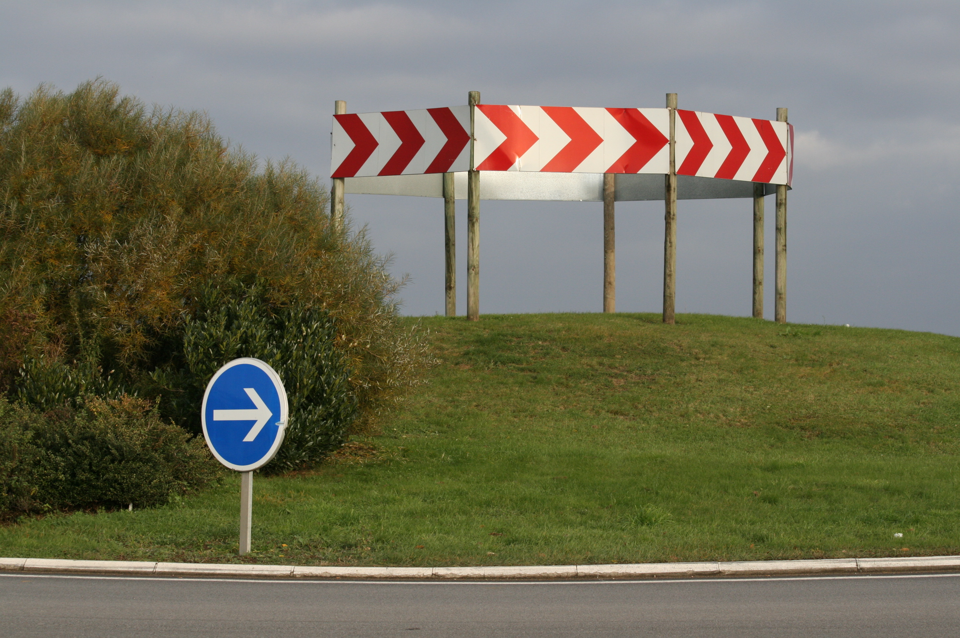 Couronne de chevrons sur giratoire : équipement non réglementaire (France)